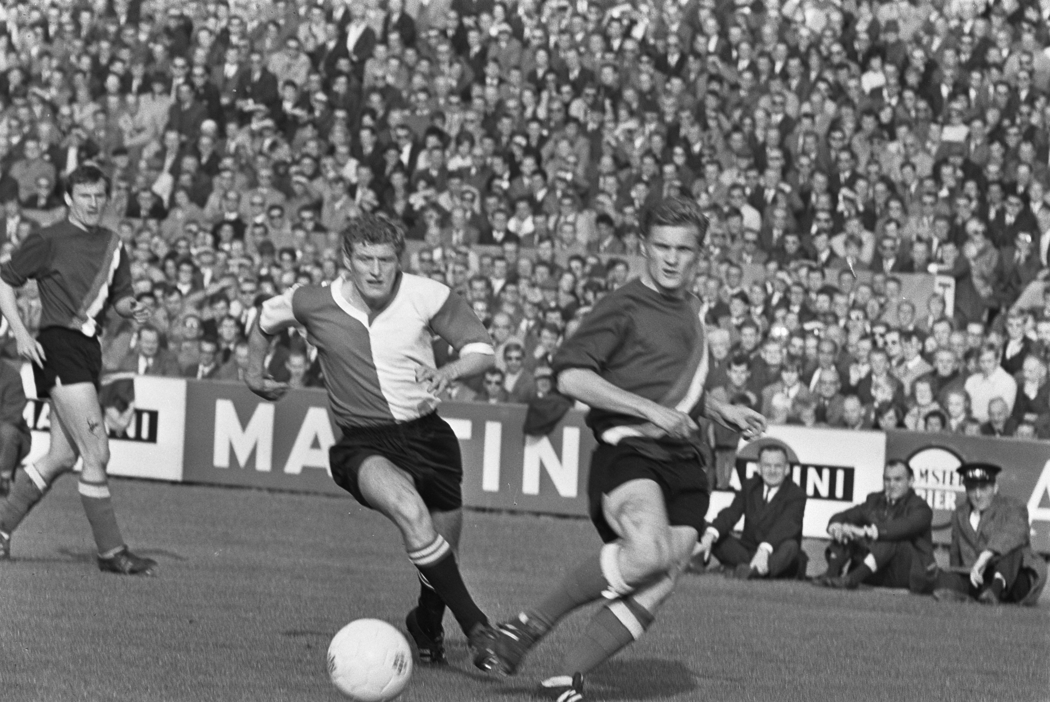 Collectie / Archief : Fotocollectie Anefo Reportage / Serie : [ onbekend ] Beschrijving : Sparta-Feijenoord 0-1. Wim Jansen in actie Datum : 20 oktober 1968 Locatie : Rotterdam Trefwoorden : sport, voetbal Persoonsnaam : Jansen, Wim Instellingsnaam : Feyenoord Fotograaf : Koch, Eric / Anefo Auteursrechthebbende : Nationaal Archief Materiaalsoort : Negatief (zwart/wit) Nummer archiefinventaris : bekijk toegang 2.24.01.05 Bestanddeelnummer : 921-7809 Reacties Geplaatst door Paul Verhoef op 15 oktober 2013 - 16:41. De Spartaan rechts is Hans Venneker.